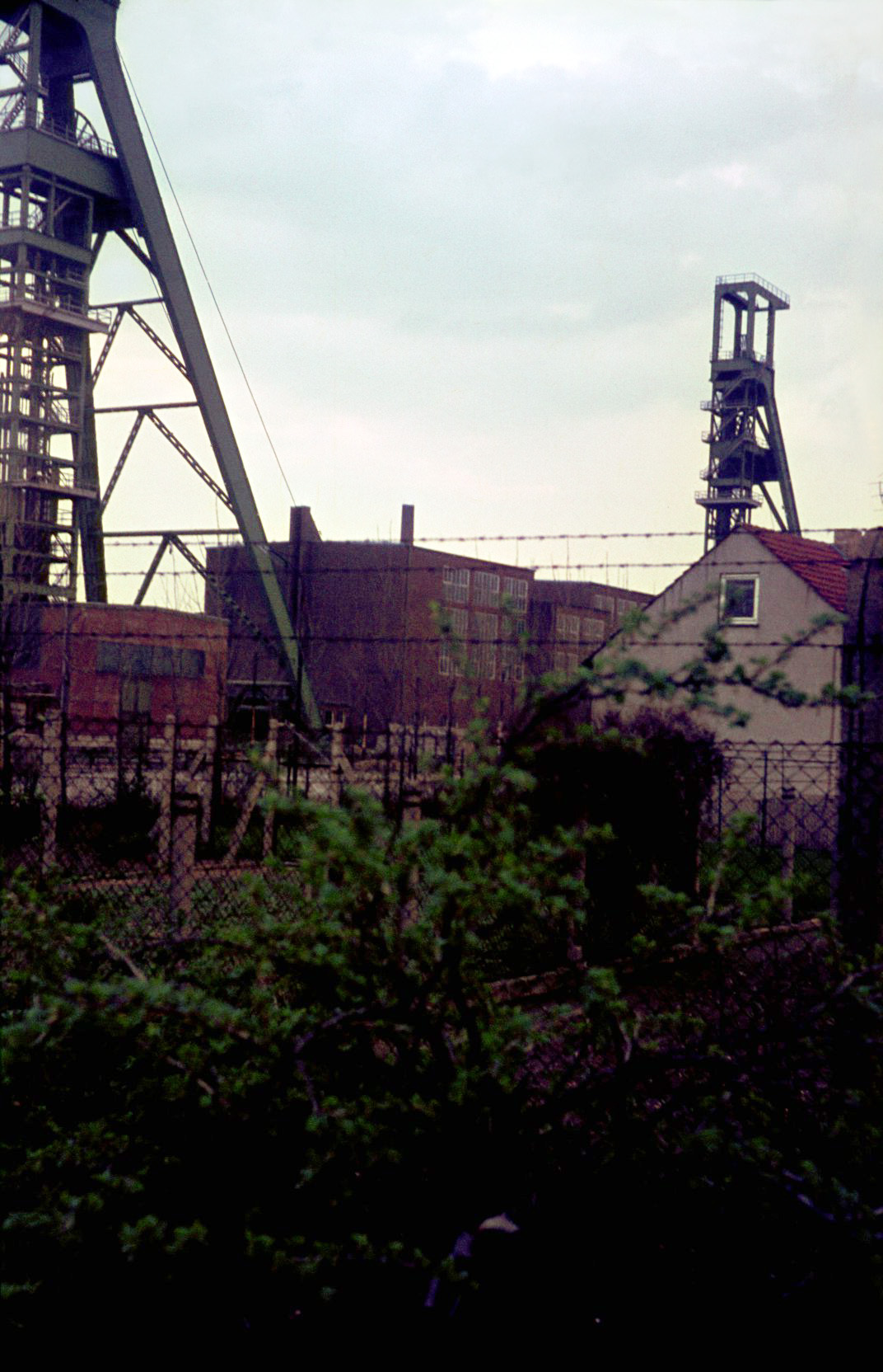 die Schachtanlage Peine I/II vom Herrenkamp aus fotografiert